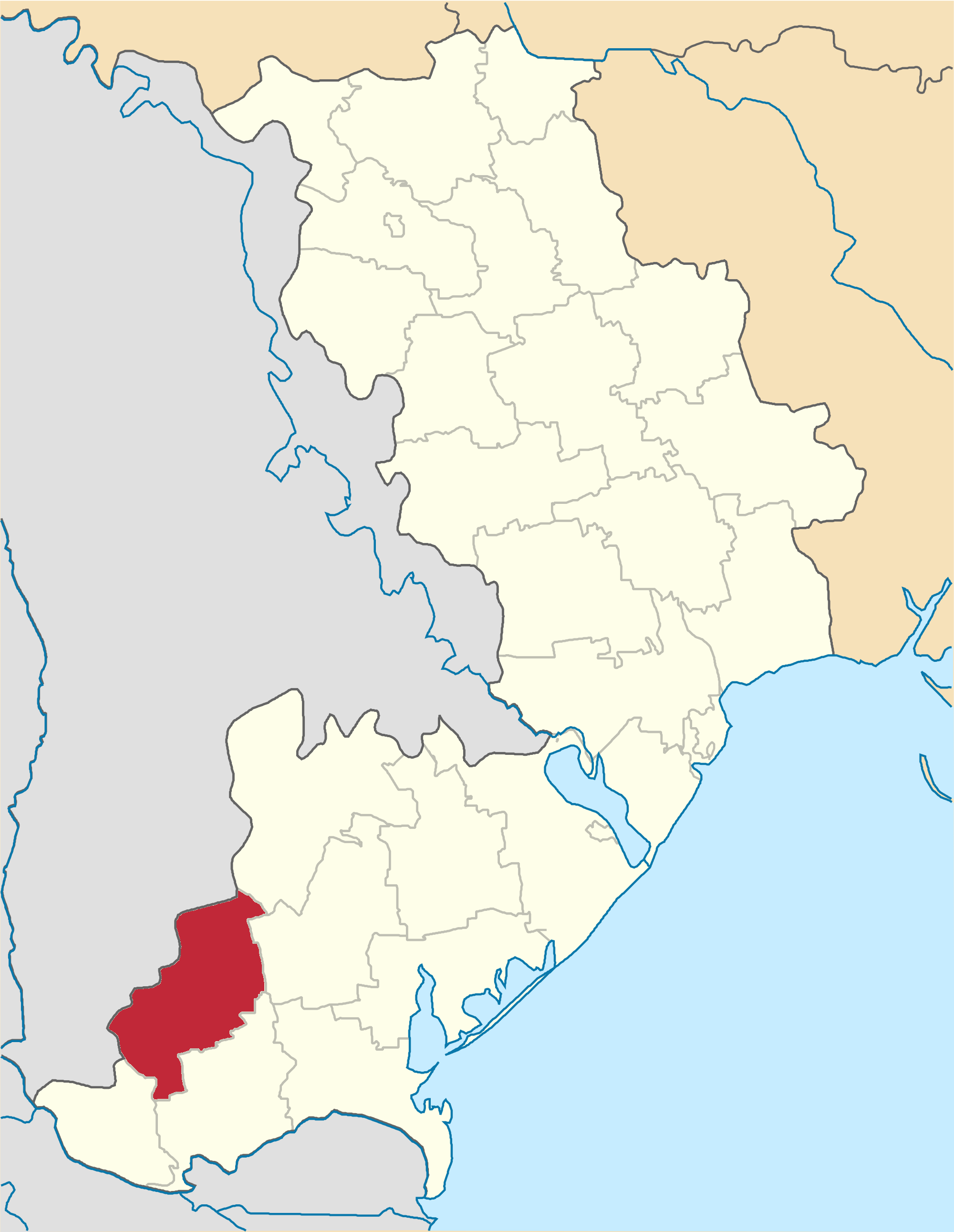 Bolgradskyi-Raion map